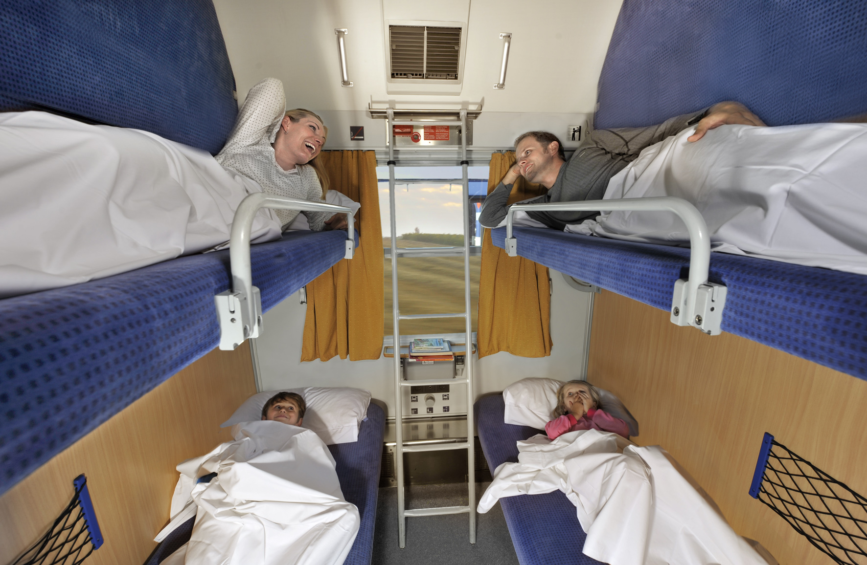 Liegewagen CNL